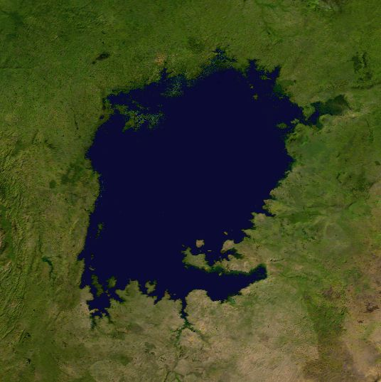 Victoriesee, Ausschnitt aus Blue Marble